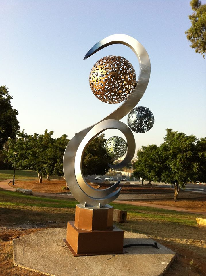 עבודת ברזל בנפחים. פסל: פסל הפנינים ישראל פרימו 200 ס"מ